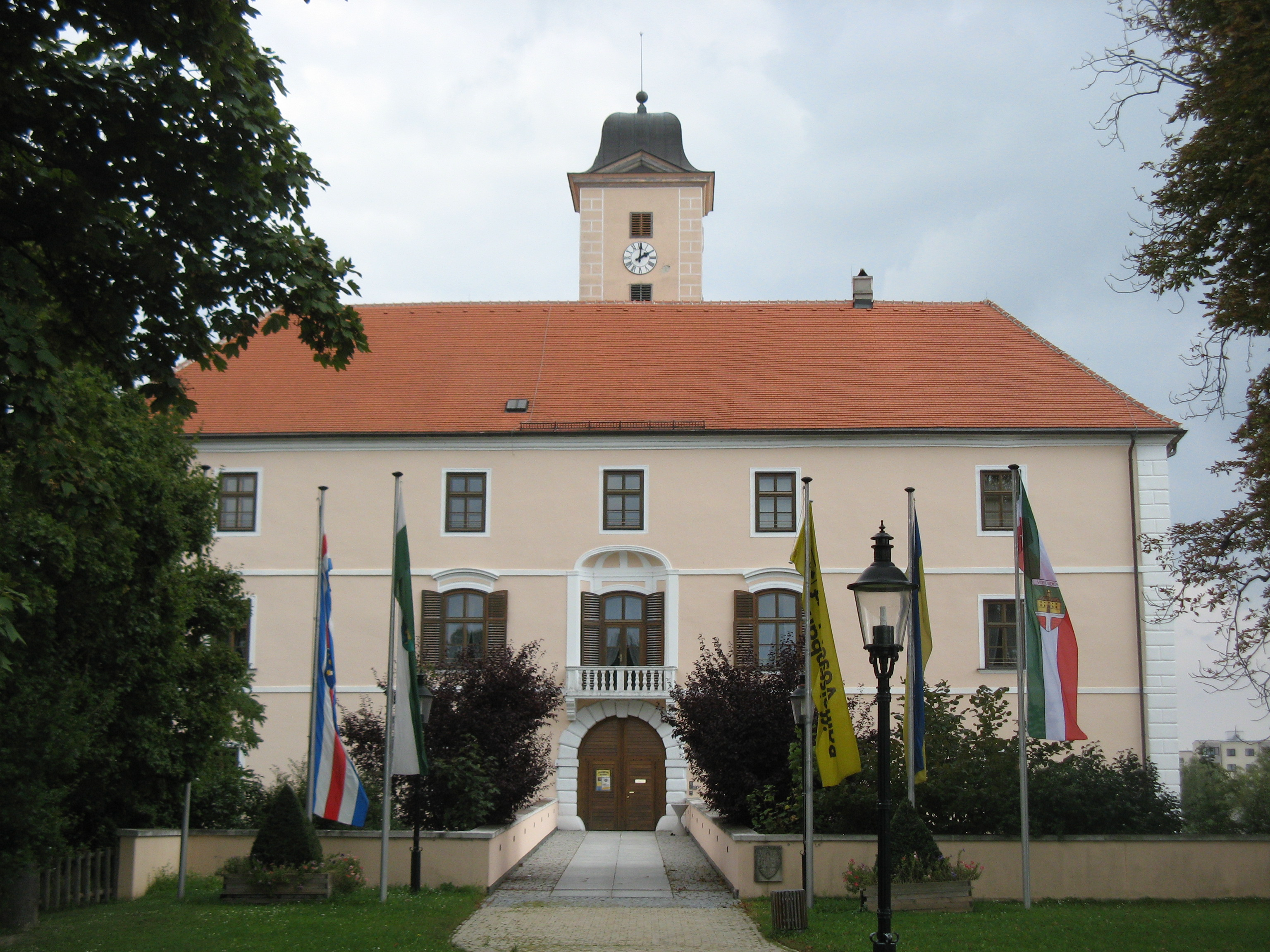 Schloss Vösendorf von Westen